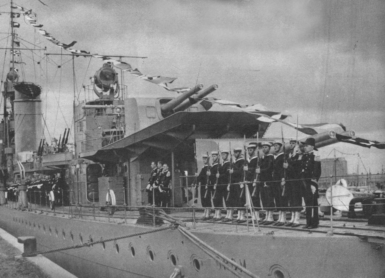 Nowy polski kontrtorpedowie O.R.P. "Grom" ze swą załogą na pokładzie, prezentującą broń. Obchody "Święta Morza" w Gdyni w 1937 roku.